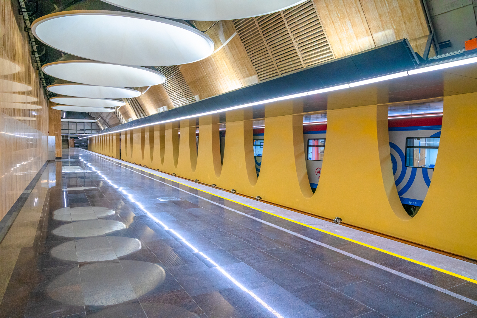 Станция Юго-Восточная Московского метрополитена в январе 2020 года. Платформа